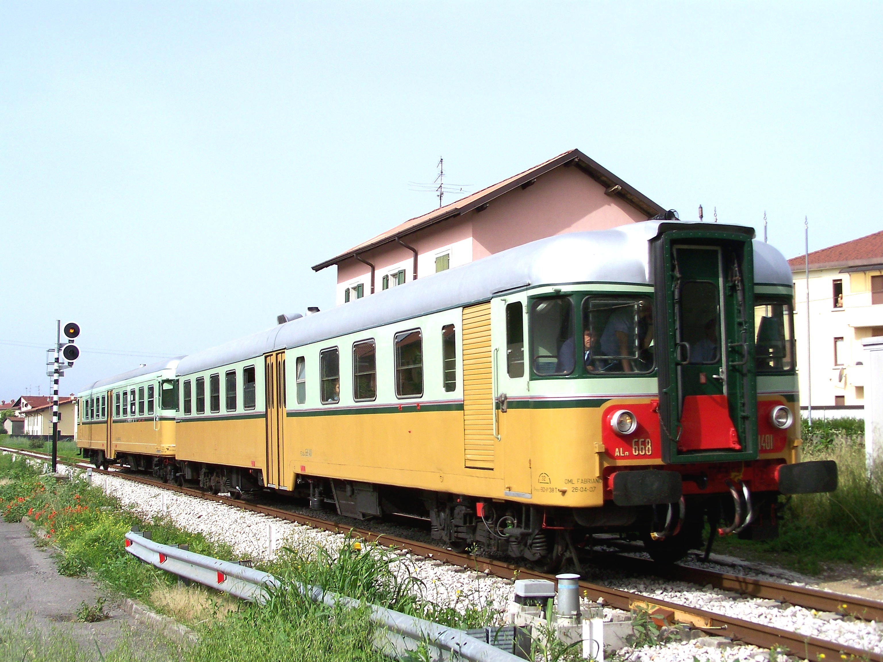 Composizione di automotrici ALn 668.1401 e ALn 668.1452 ritratta nei pressi della stazione di Rovato Città sulla Bornato-Rovato.